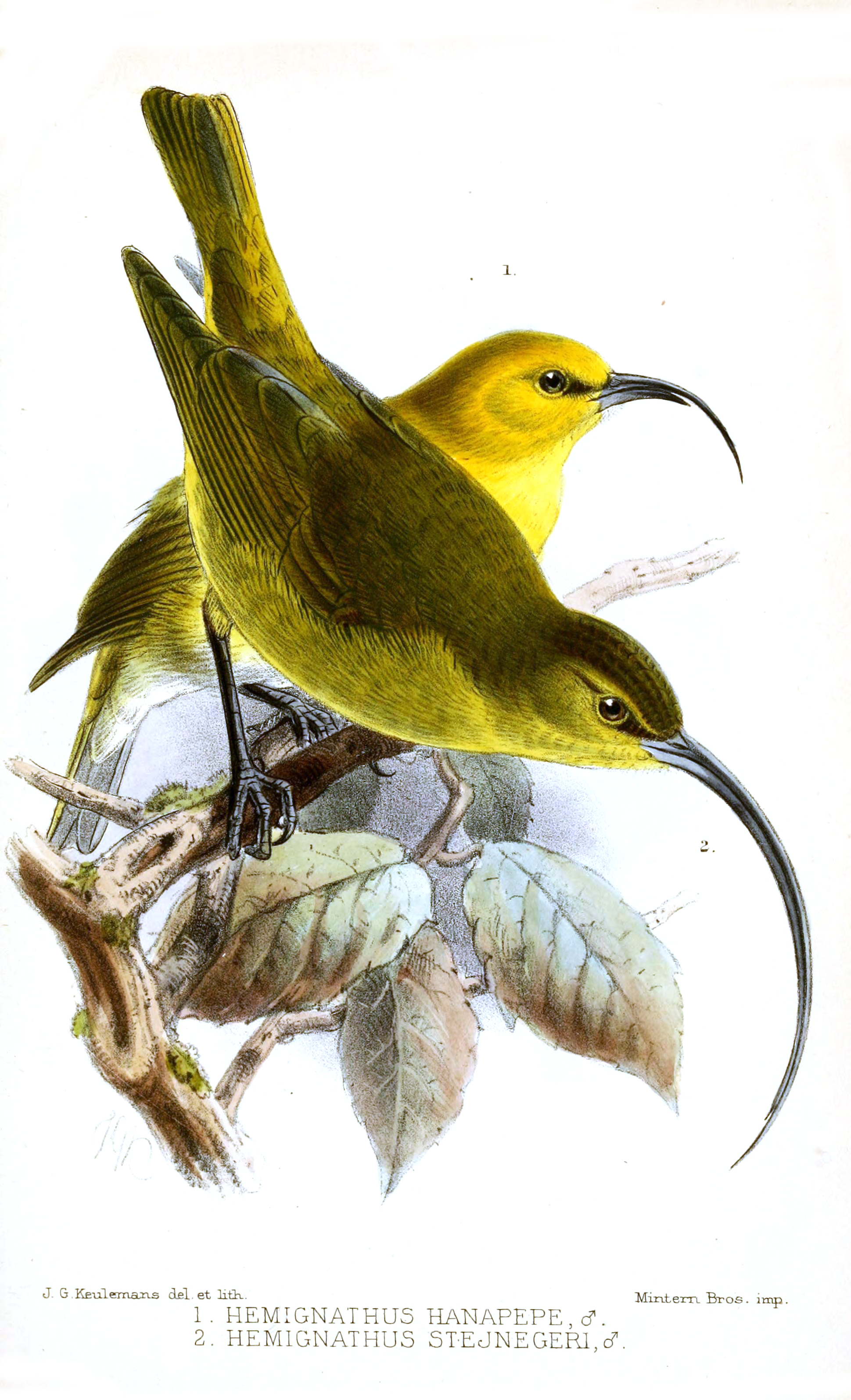 Hemignathus hanapepe (m) = Hemignathus lucidus hanapepe Hemignathus stejnegeri (m) = Hemignathus ellisianus stejnegeri †